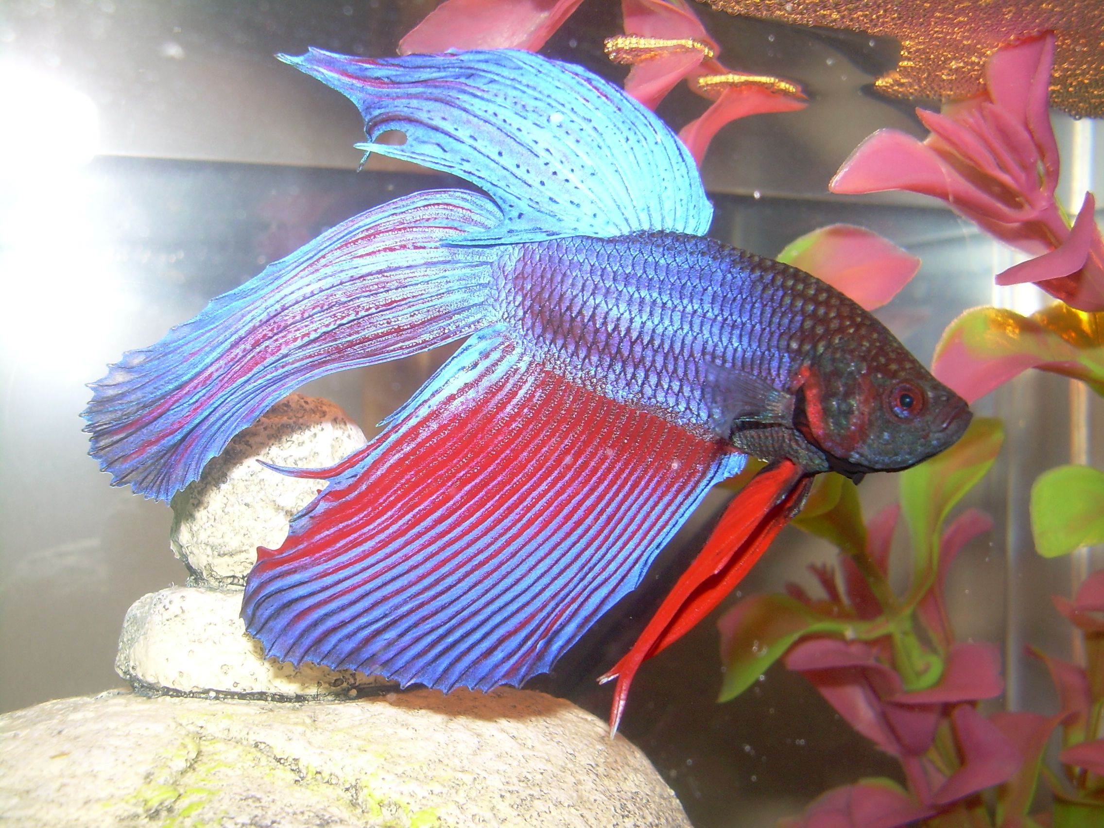 Red and blue Betta splendens.